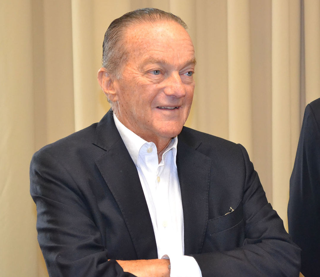 Ex-senador catarinense Jorge Bornhausen